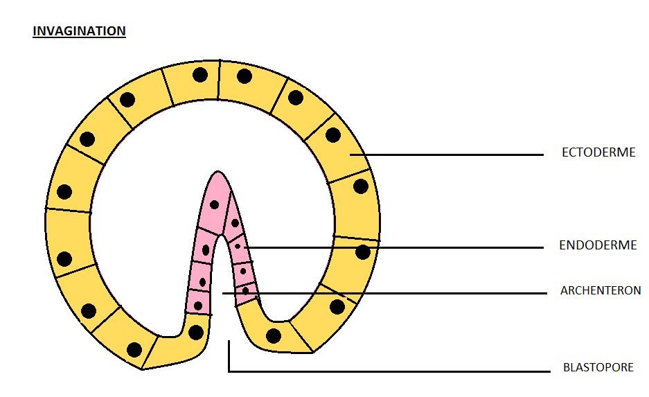 ceci est le schéma d'un type de gastrulation.